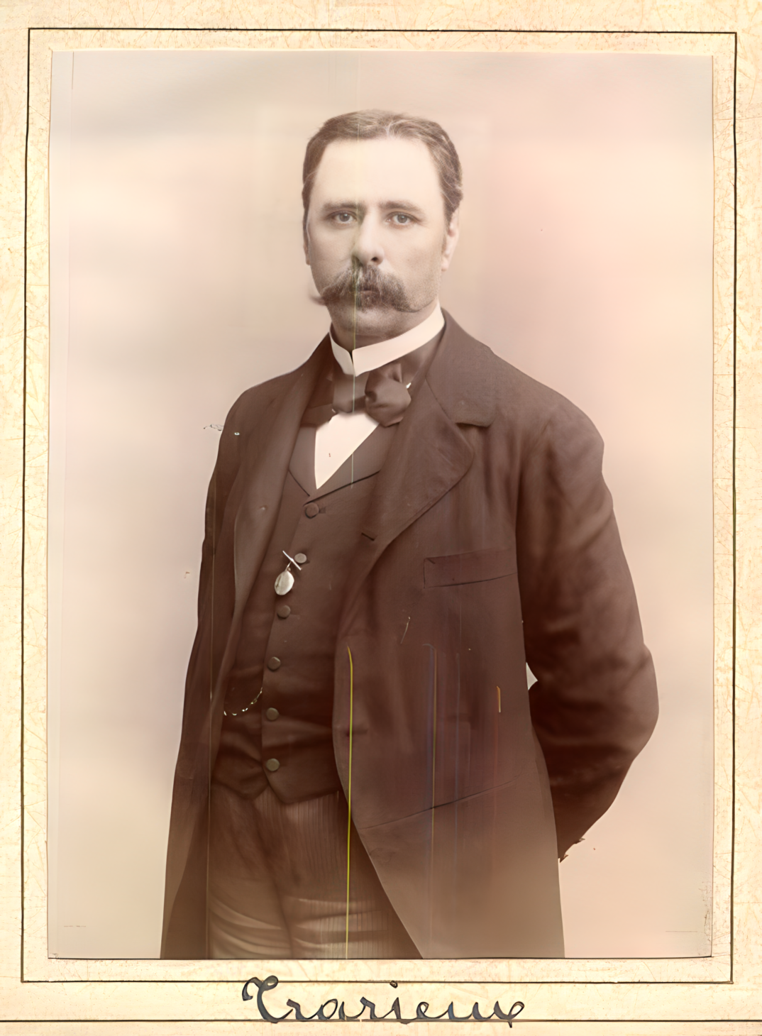 Ludovic Trarieux, vers 1890.